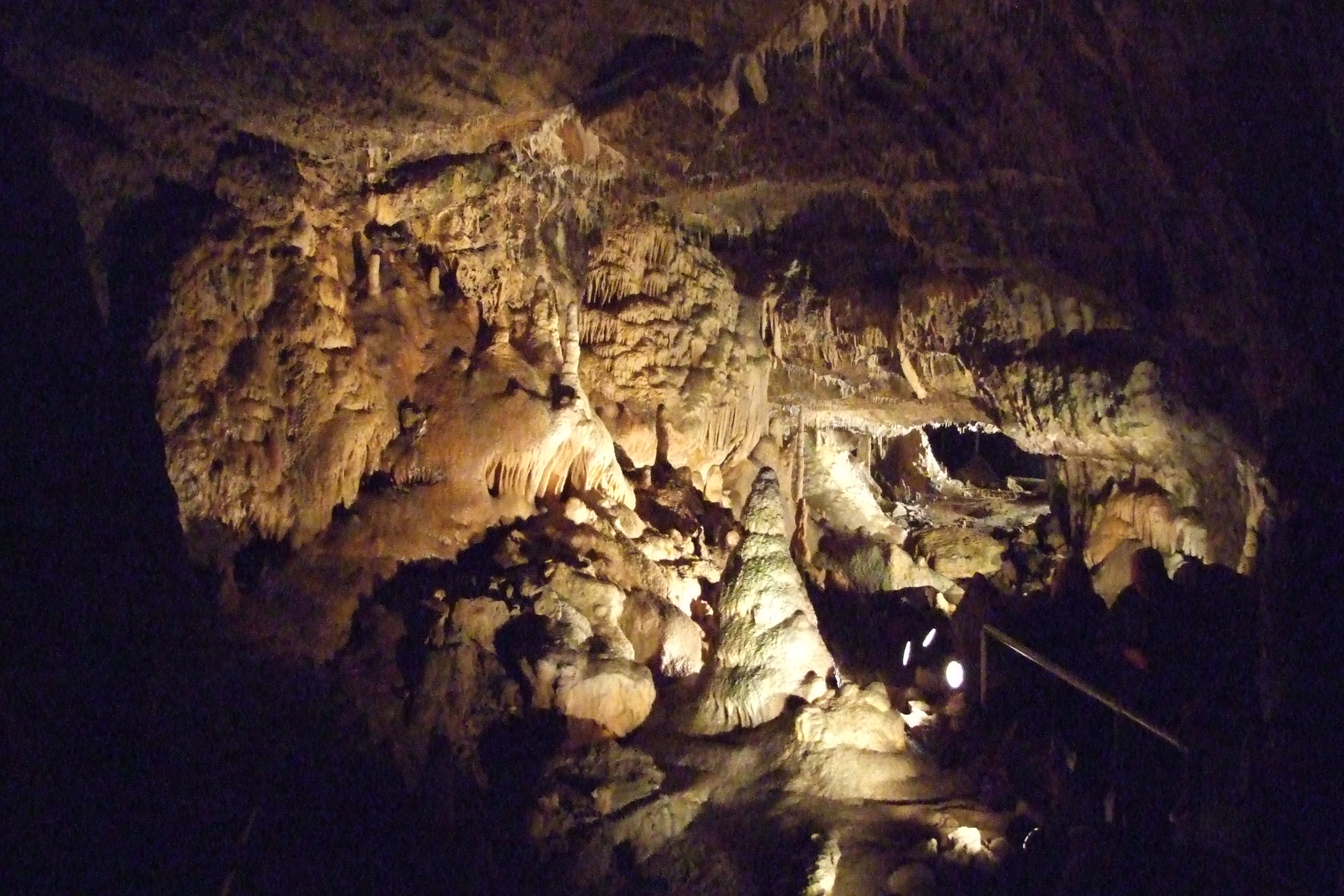 Hotton Caves, Hotton, Belgium